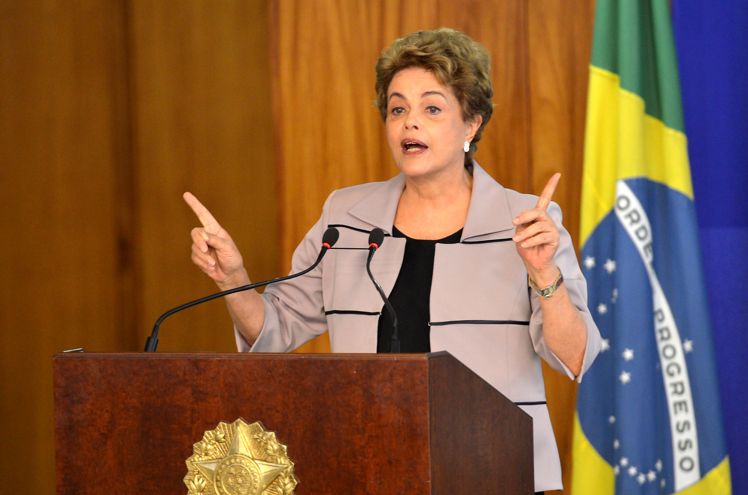 A presidente Dilma Rousseff, durante cerimônia no Palácio do Planalto, recebe apoio de intelectuais e artistas contra o processo de impeachment.